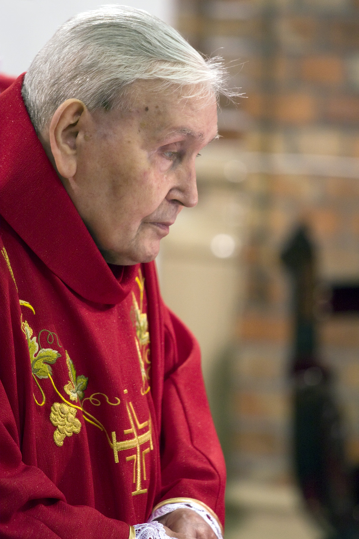 Biskup Senior Jan Mazur podczas Eucharystii Młodych - XXIII Światowe Dni Młodzieży, obchody w diecezji siedleckiej